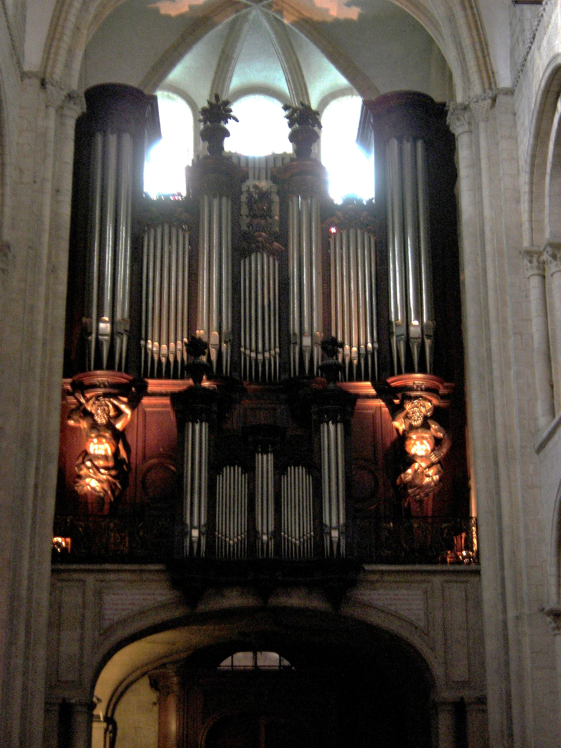 orgue d'Aristide Cavaillé-Coll de 1885 dans la nef de l'église Saint-Étienne de l'ancienne abbaye aux Hommes de Caen (Calvados, Basse-Normandie), restauré par Jacquot-Lavergne. Buffet édifié en 1740 par François Poche pour l'orgue de Jean-Baptiste-Nicolas Lefèbvre terminé en 1745, classé Monument Historique au titre objet par la liste de 1840.